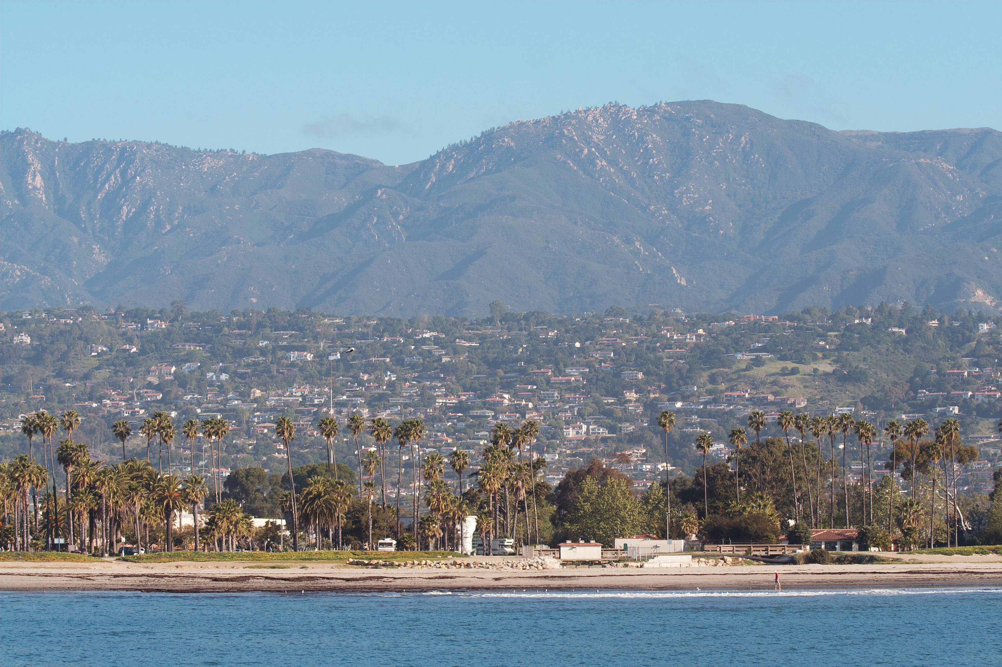 Santa Barbara, California